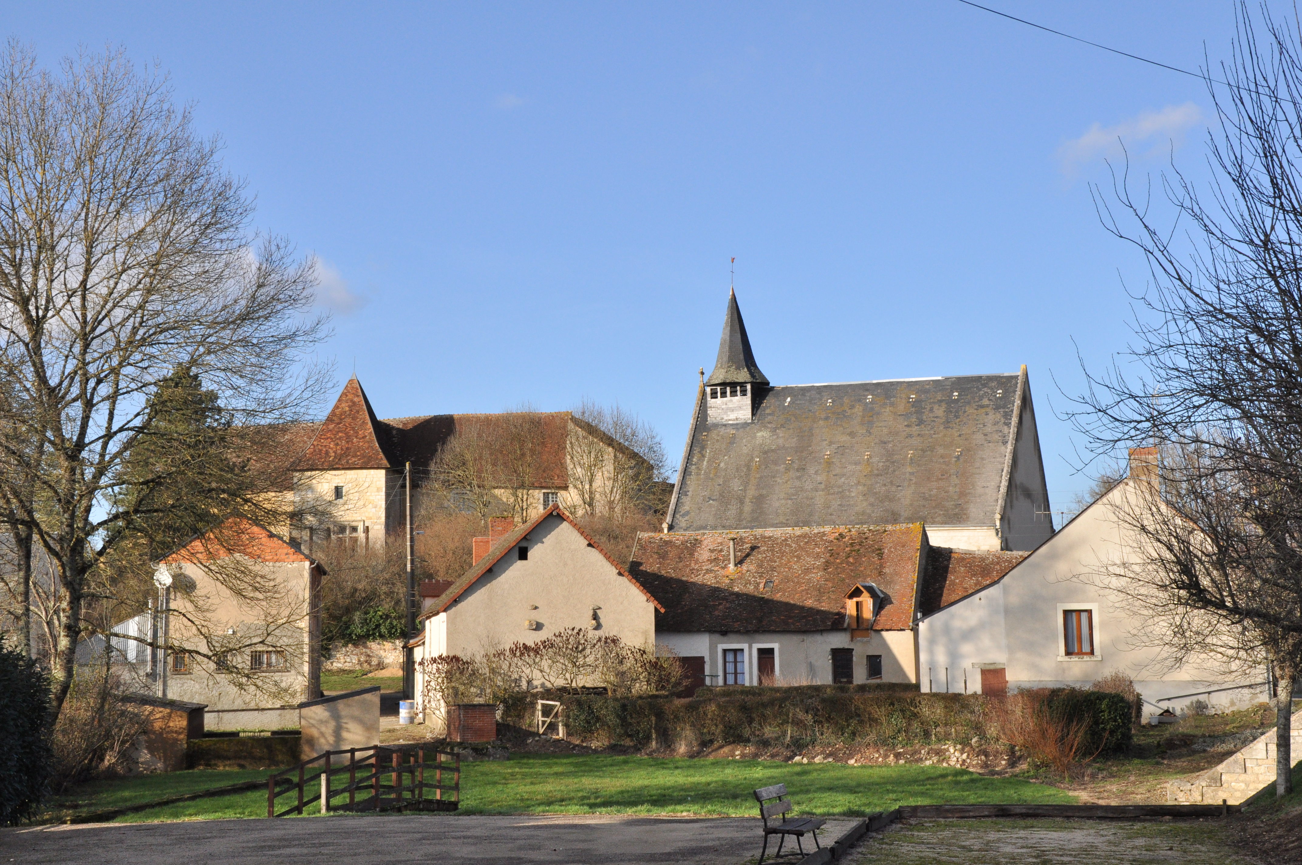 Luzeret (Indre) - Eglise et château